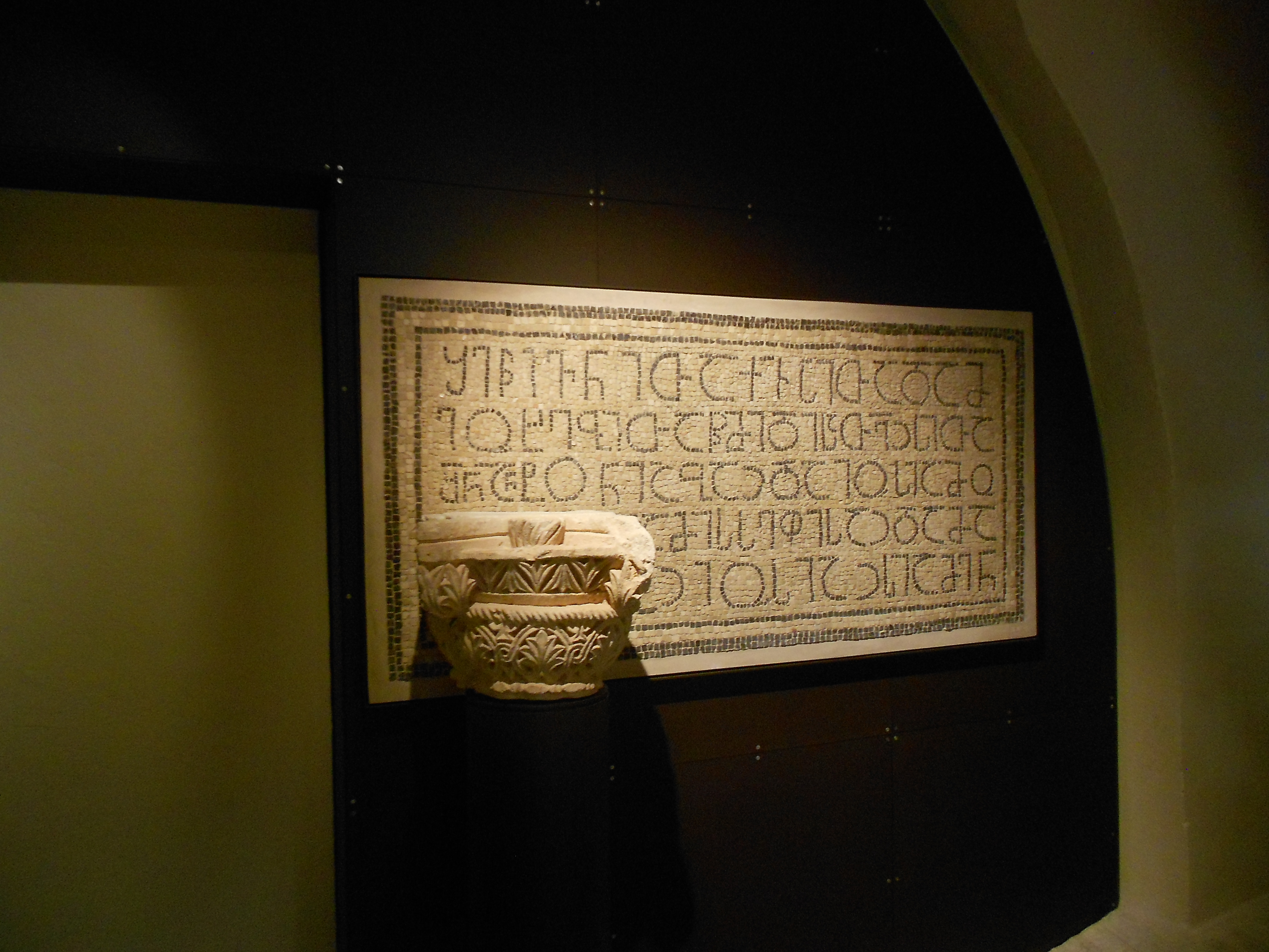 Visite du Terra Sancta Museum à Jérusalem le 13-10-2018